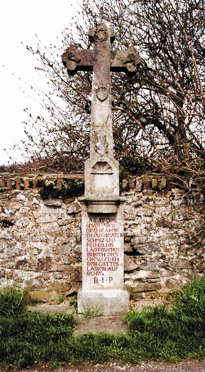 Kreuz an Mauer von Burg Gudenau